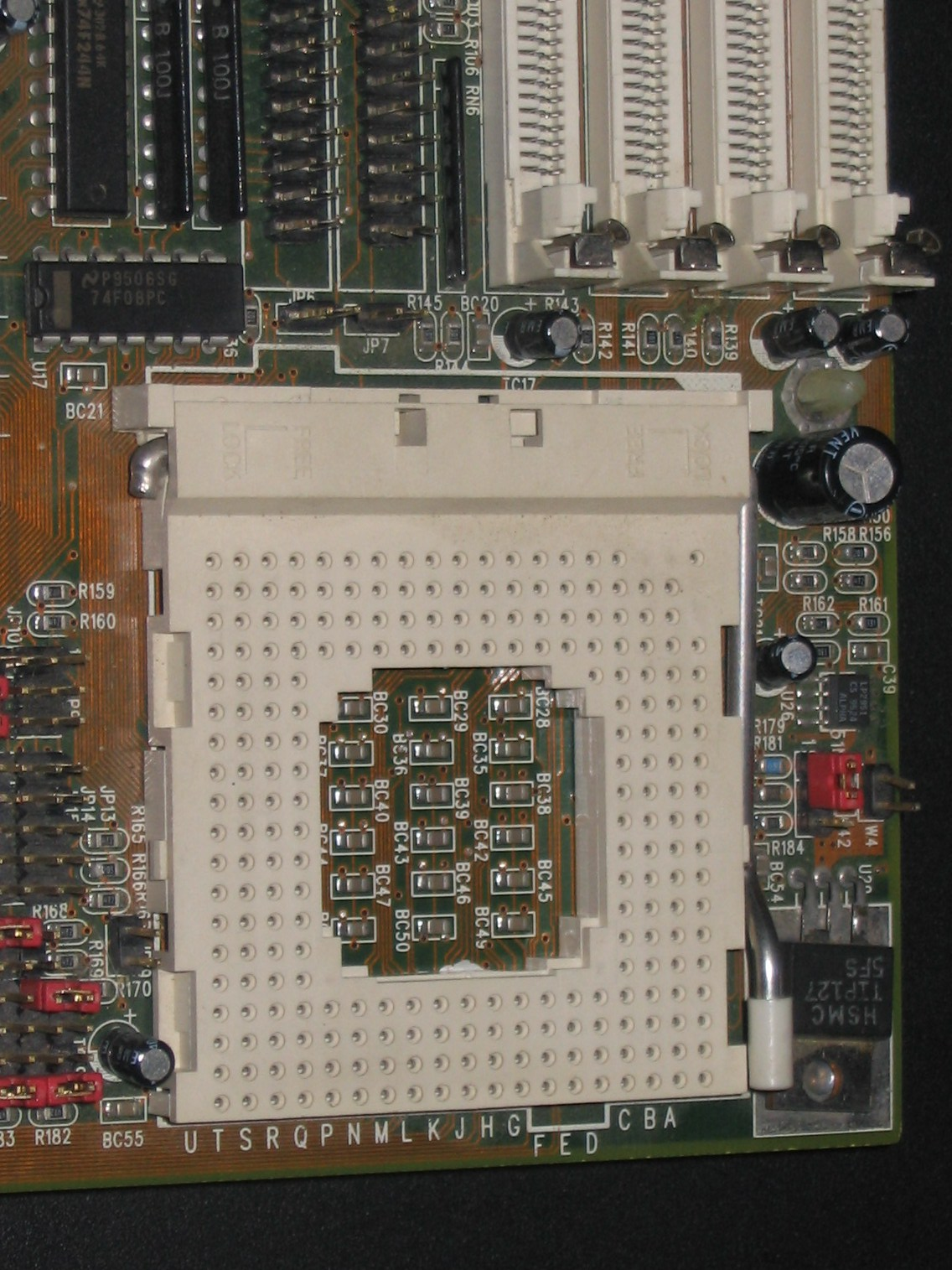 Socket 3